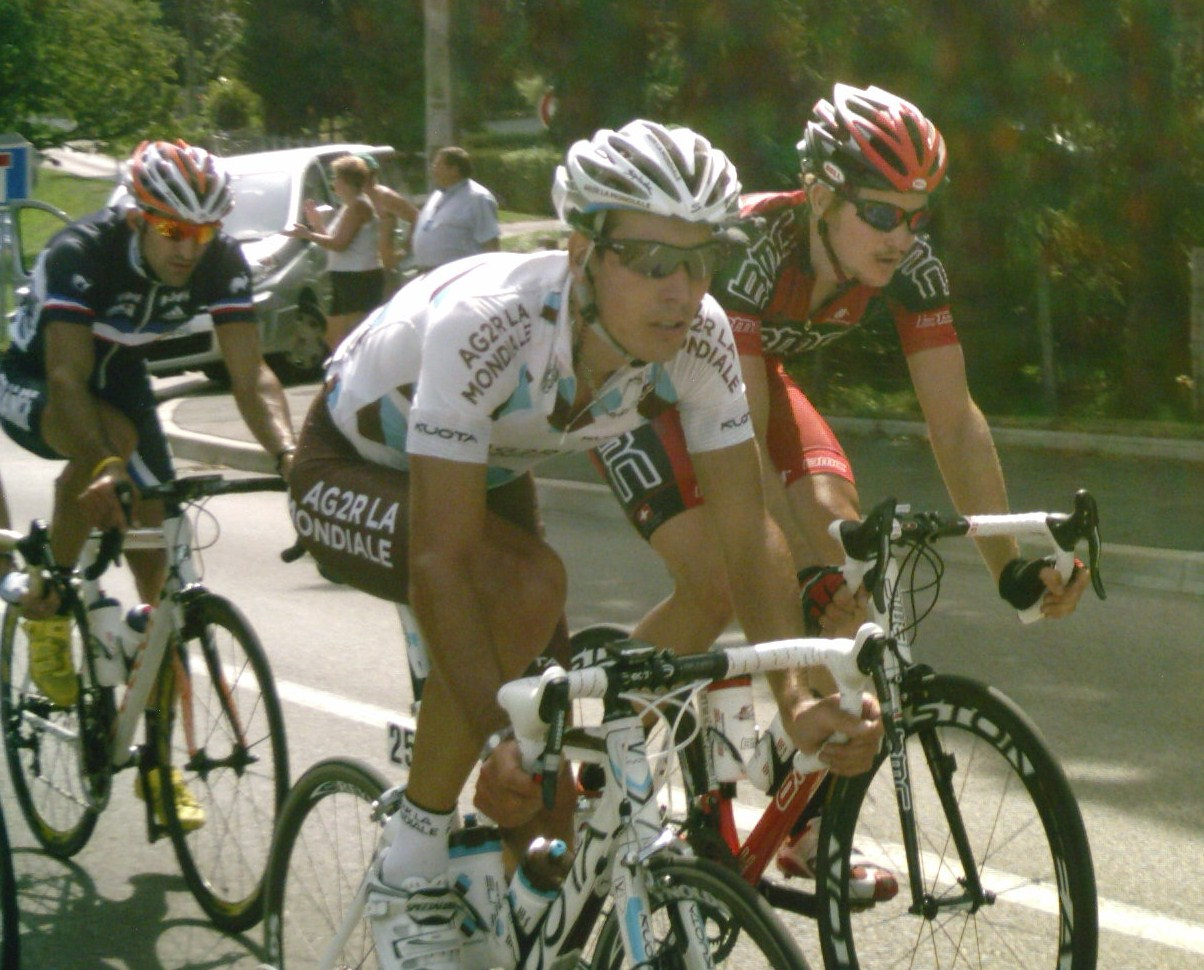 Les quatre échappées de la première étape du Tour de l'Ain 2010 : Geoffrey Soupe (Equipe de France Espoir), Julien Loubet (Ag2r-La Mondiale), Chris Barton (BMC) et (absent de la photo : Ronan Racault (Big-Mat))